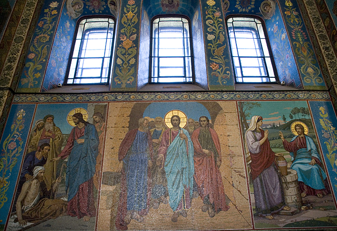 Собор Воскресения Христова